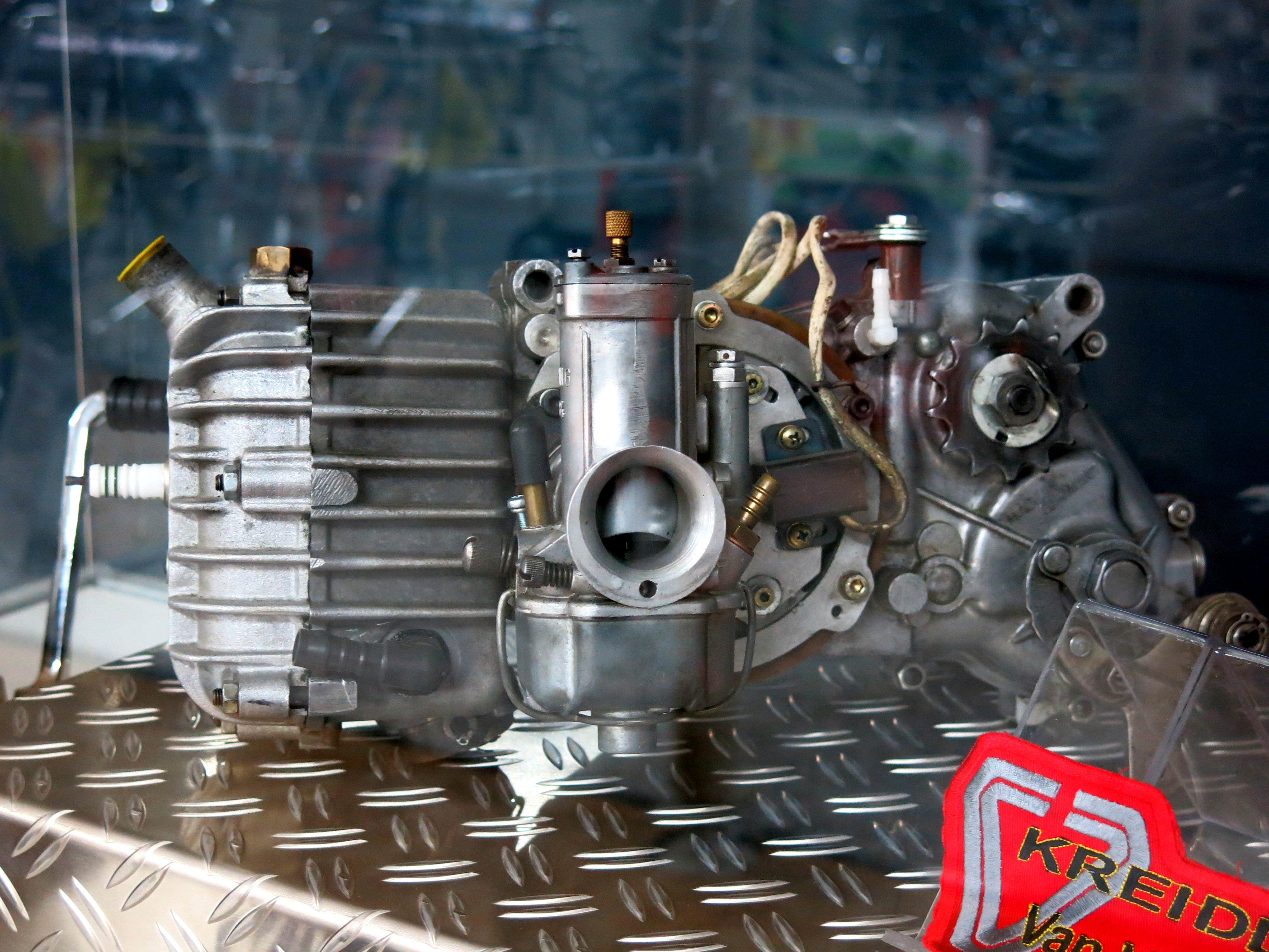 Kreidler Rennkit mit Wasserkühlung und Drehschiebermotor (1974)